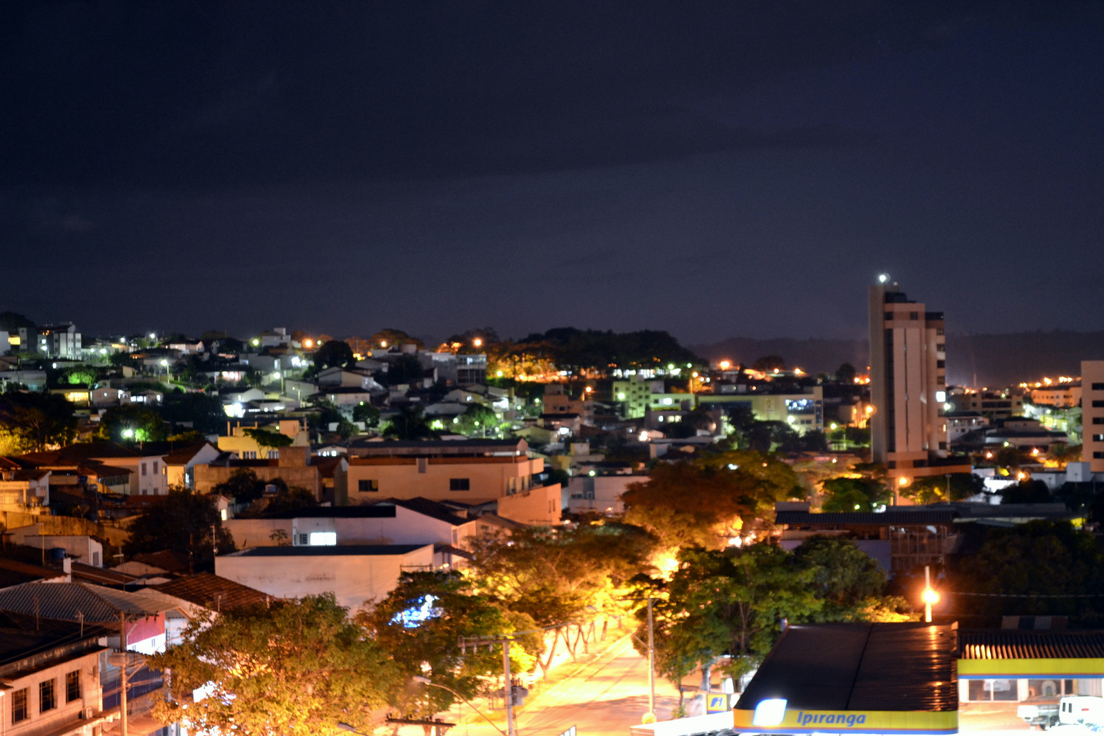 Pará de Minas adormecida